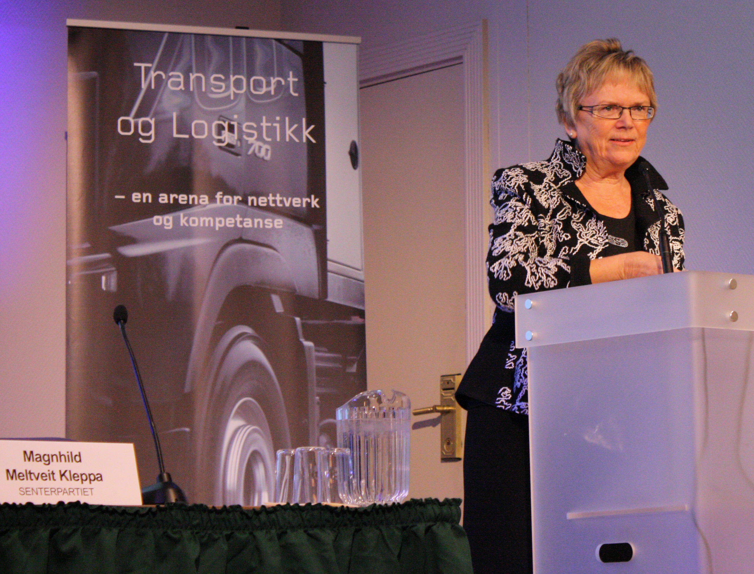 Samferdselsminister Magnhild Meltveit Kleppa (Senterpartiet) under konferansen Transport og Logistikk 2010.